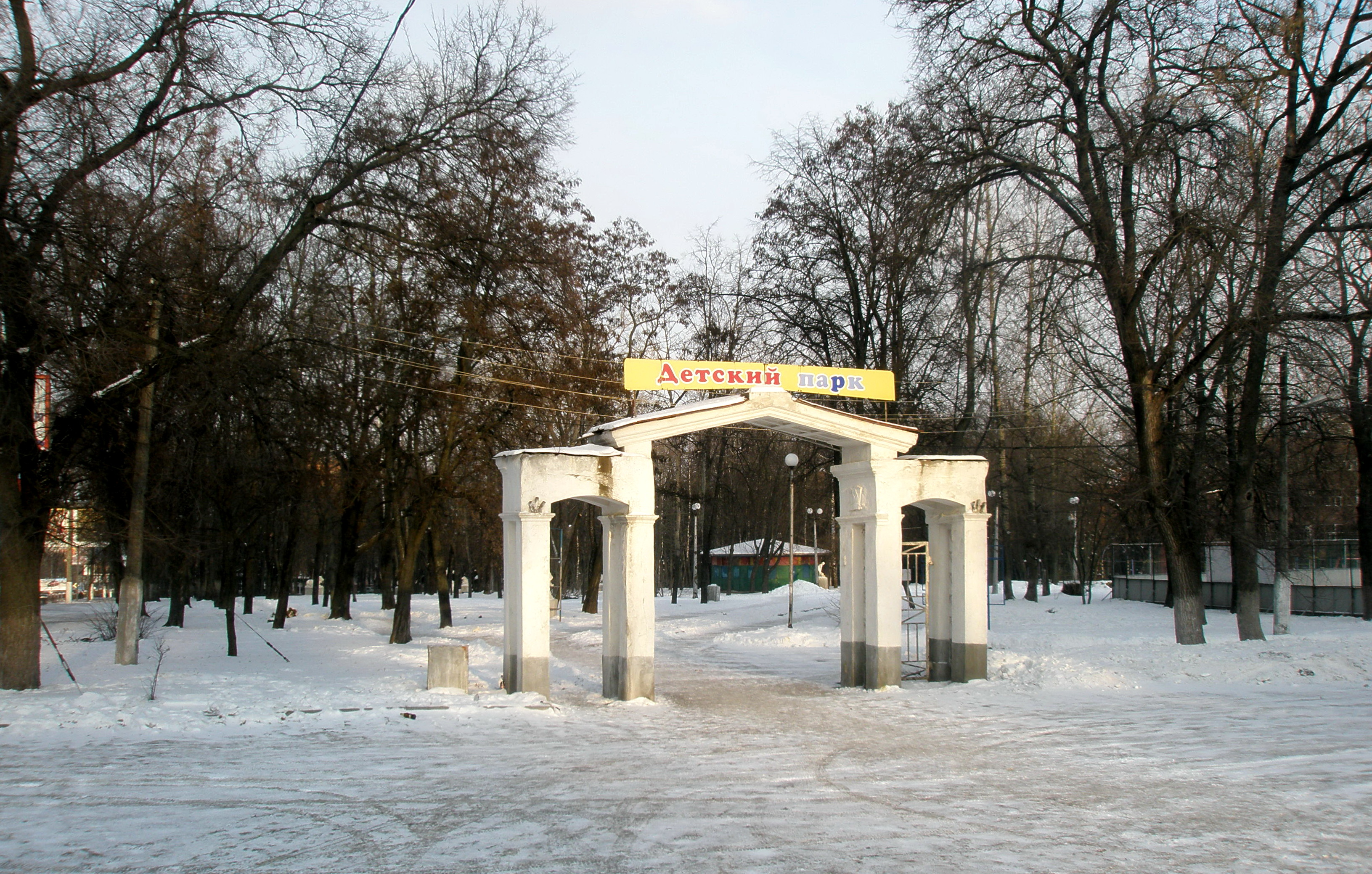 Детский парк (Парк Пионеров) на улице Перекальского Курска